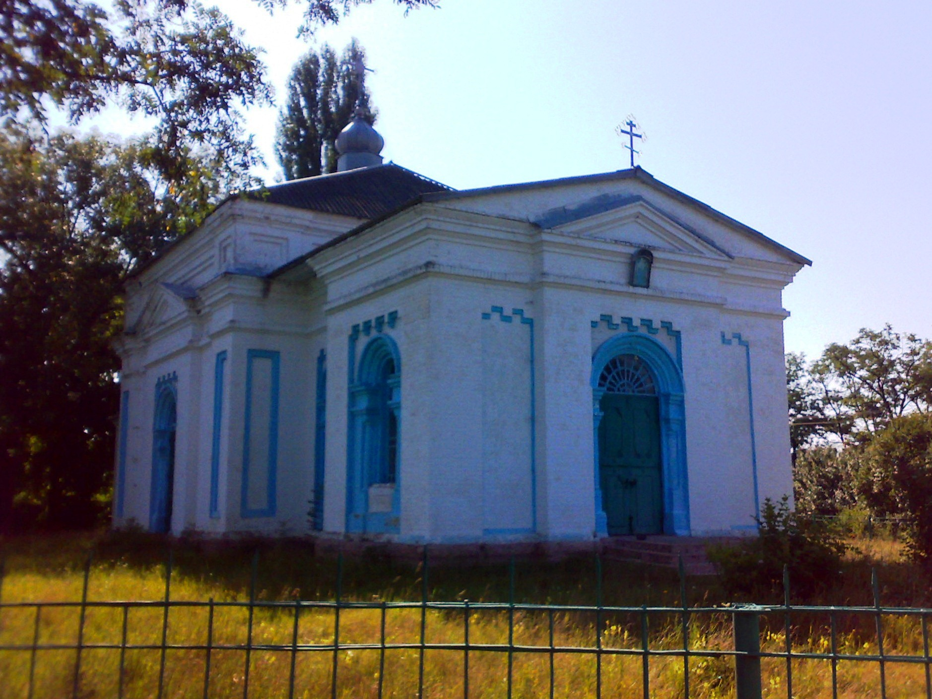 Покровська церква (Андріївка, Новомиргородський район, Кіровоградська область, Україна)